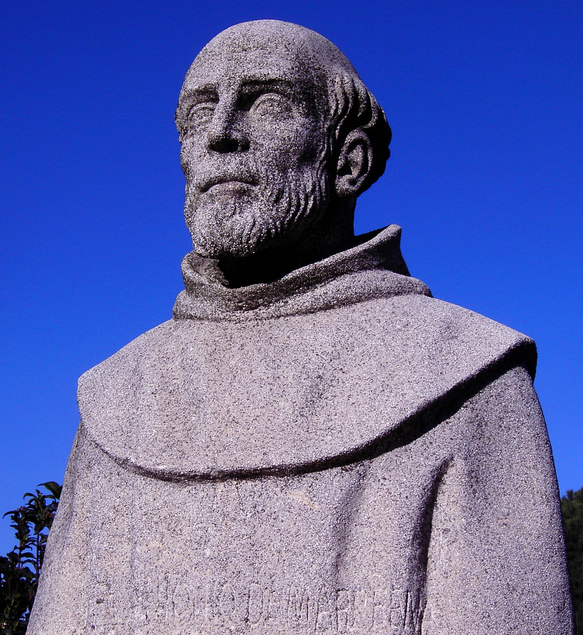 Fray Antonio de Marchena. Religioso del convento de la Rábida en la época colombina.